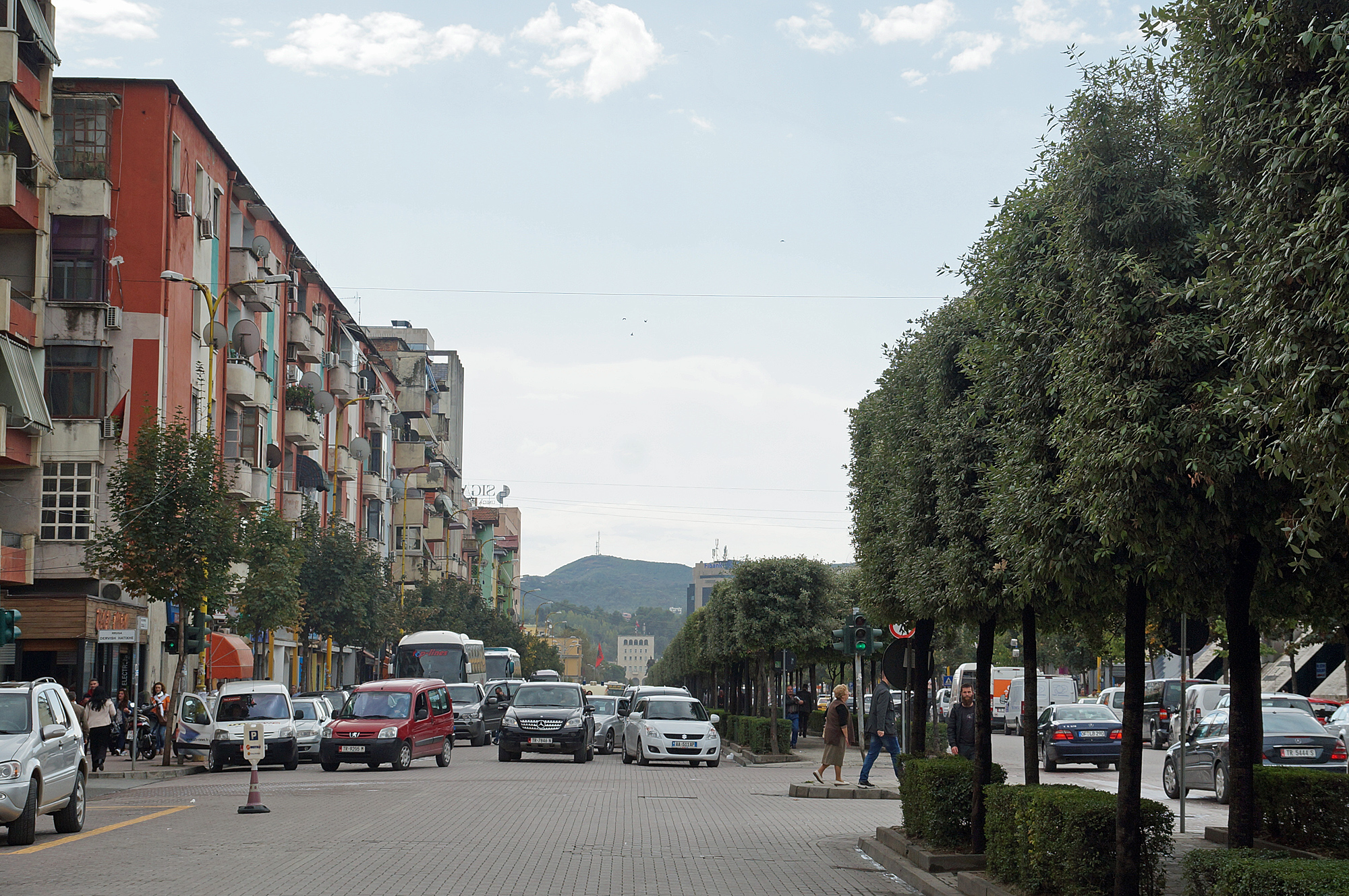 Bulevardi Zogu i Parë në Tiranë